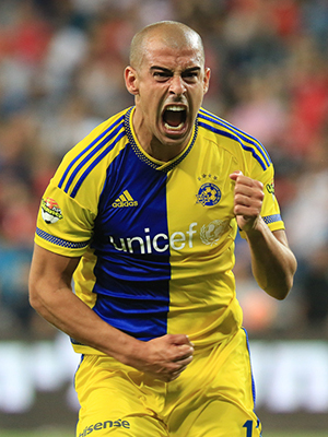 טל בן חיים חוגג שער ניצחון